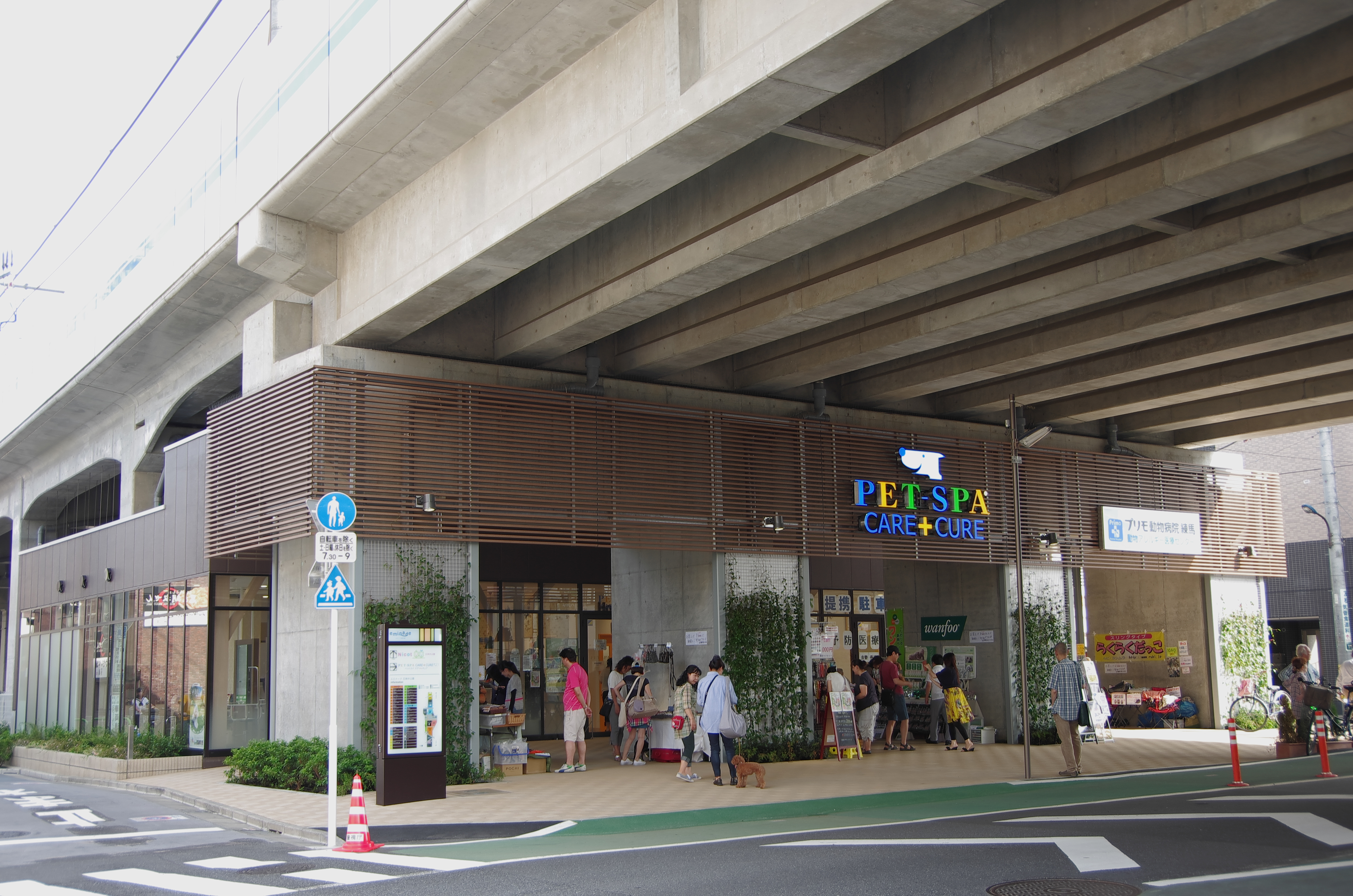 高架化後開設されたPET-SPA石神井公園をエントランス側から撮影。